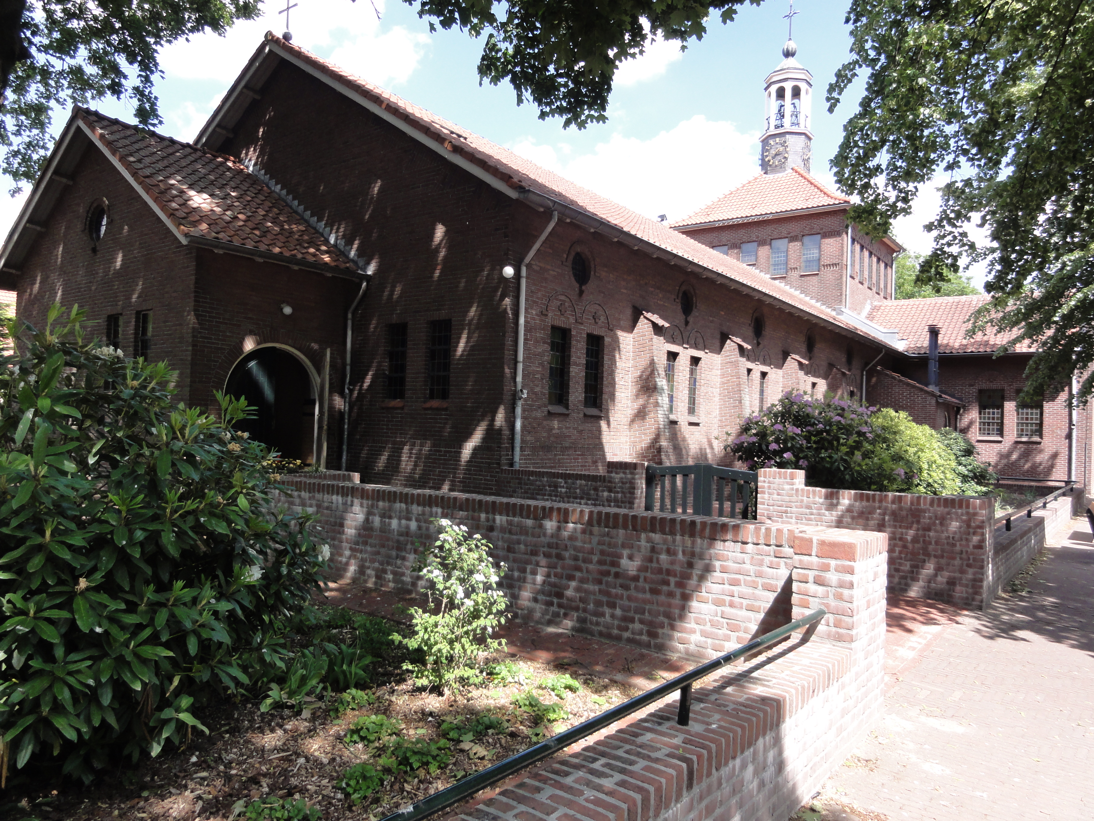 Venhorst (Boekel) Sint-Josefkerk